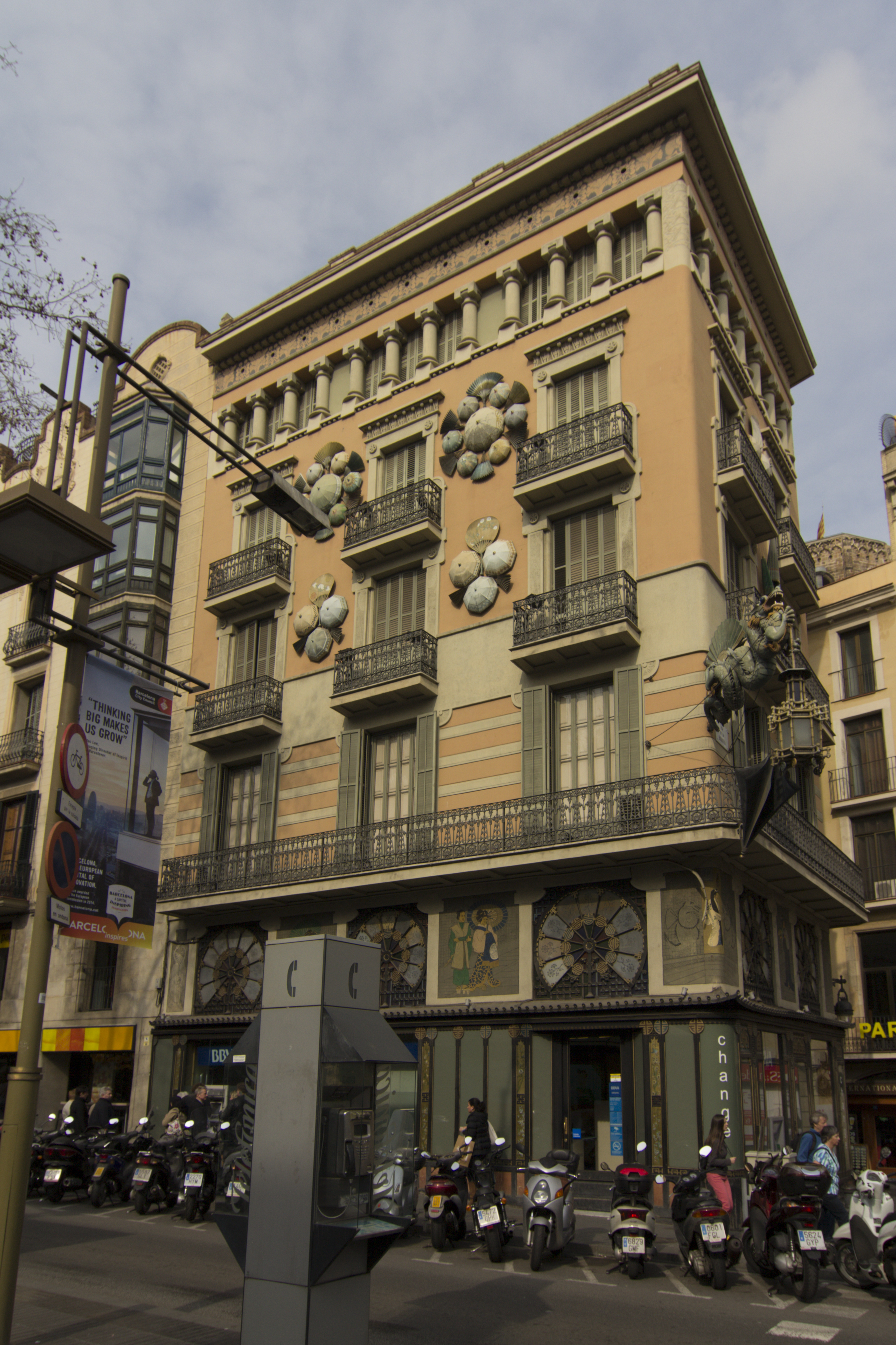 El Raval, Barcelona, Spain